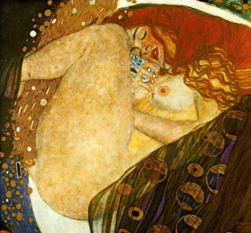 Danae